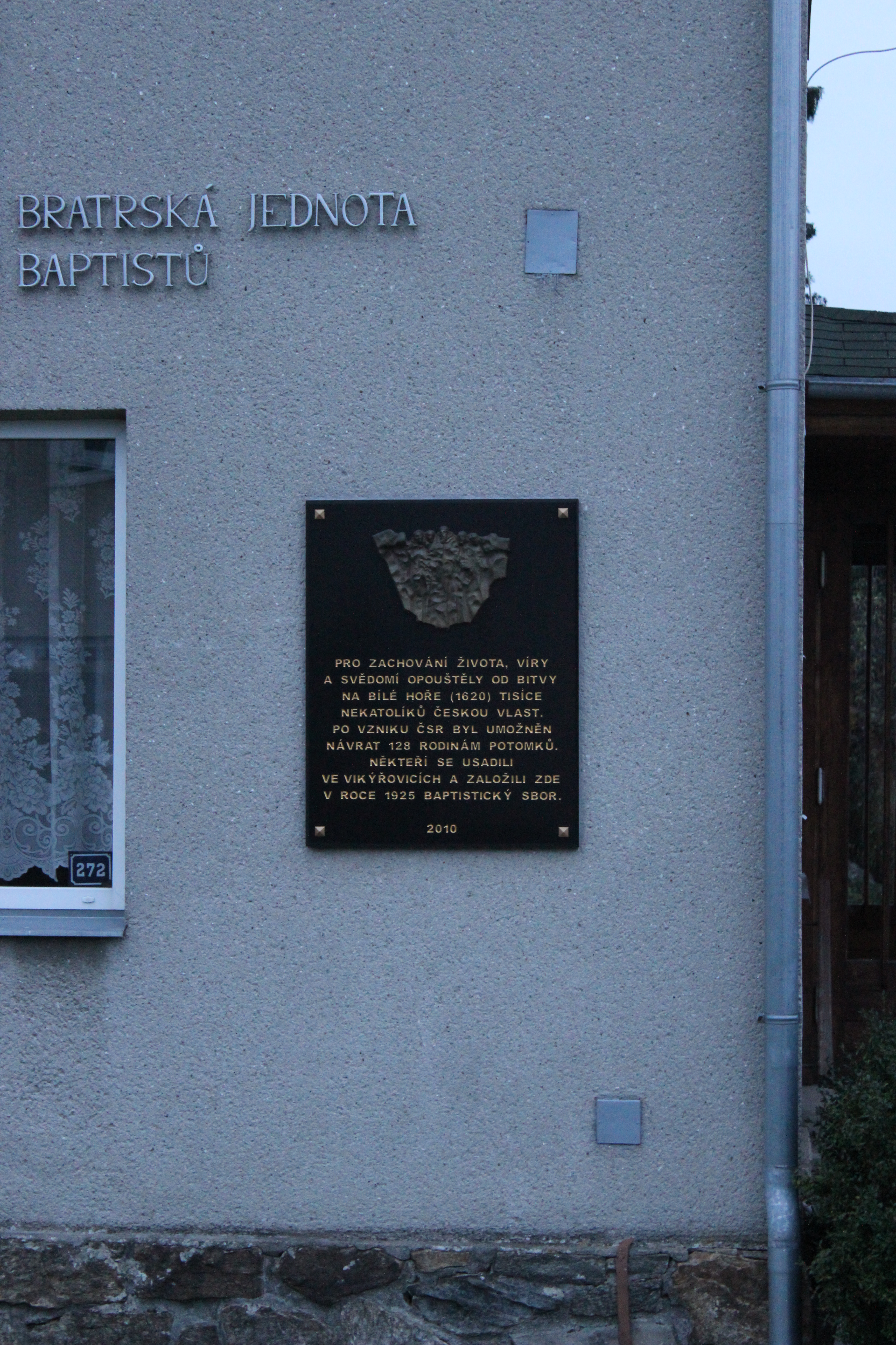 Modlitebna Bratrské jednoty baptistů ve Vikýřovicích.